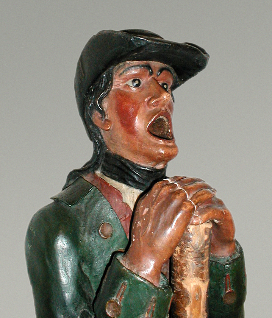 "Maulaff", hölzerne Spielfigur aus dem Park Schönbusch bei Aschaffenburg aus dem Jahr 1778